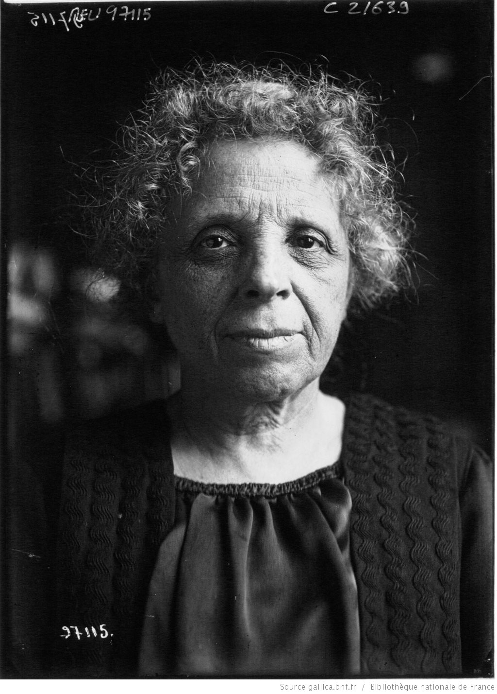 Jeanne Bouvier en 1922